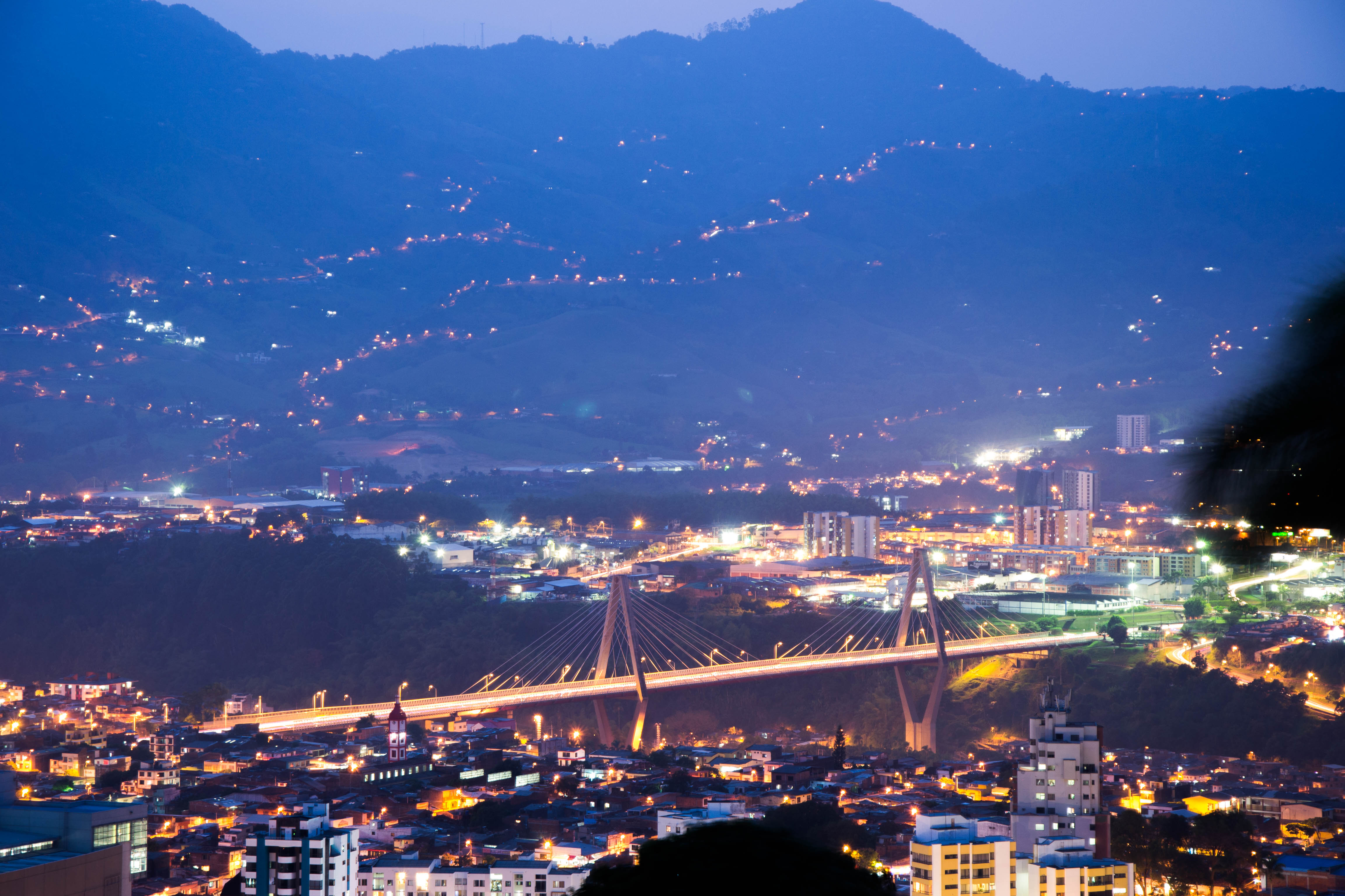 Viaducto Cesar Gaviria Truillo. Vista nocturna de la capital risaraldense